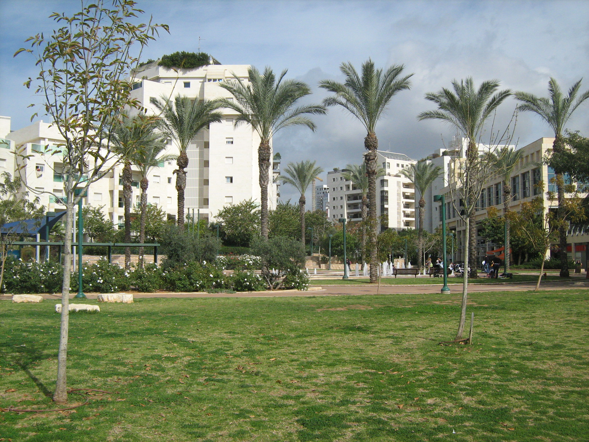 מרכז מיקאדו בתל ברוך צפון